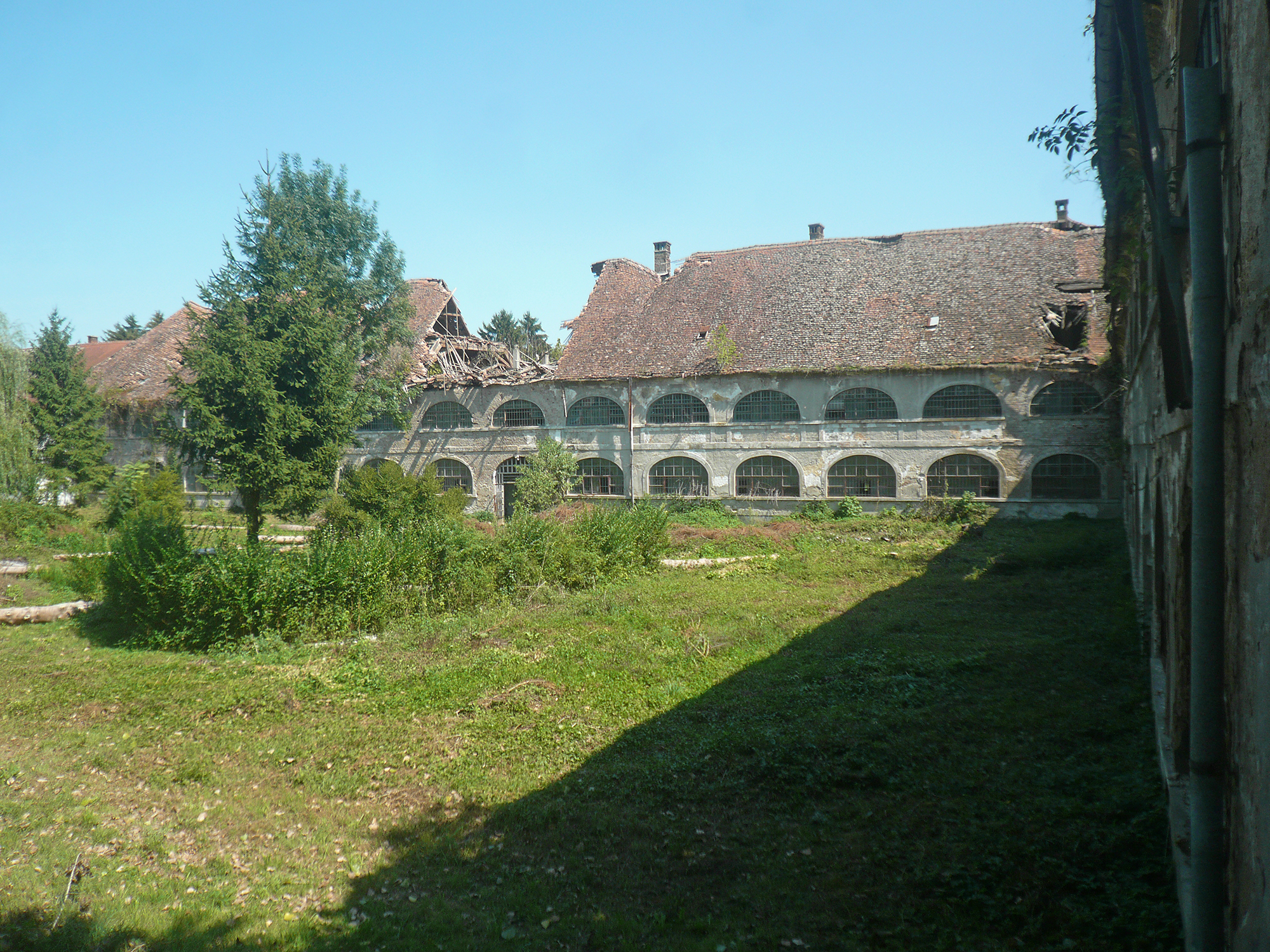 Wiese im Hof des ehemaligen Gefängnisses Stara Gradiska